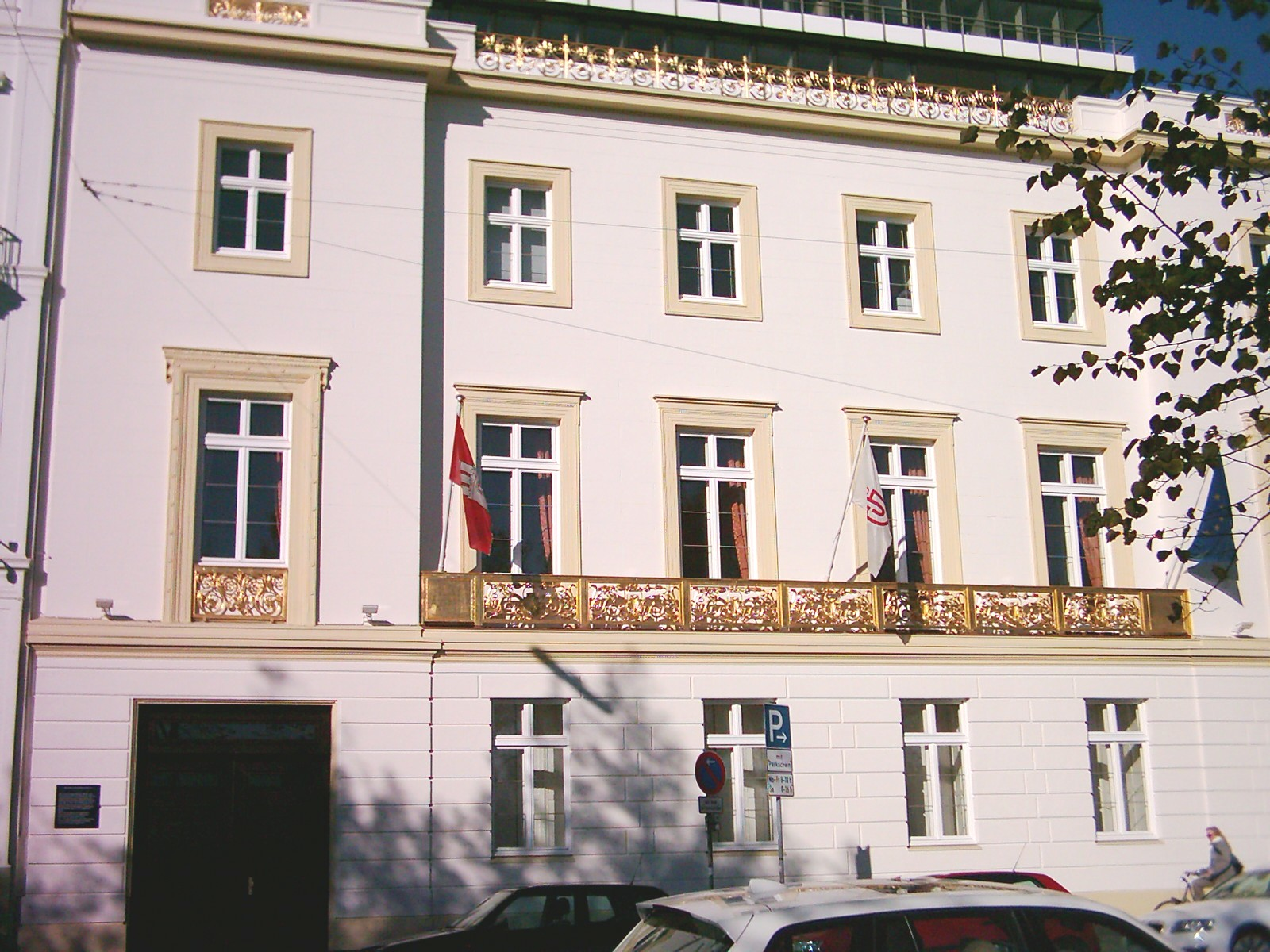 Patrizierhaus am Neuen Jungfernstieg 19 in Hamburg-Neustadt. 1831 - 33 von Franz Gustav Joachim Forsmannfür den Hamburger Bankier Gottlieb Jenisch erbaut, restauriert 1967 - 1970. Siehe auch Infotafel Image:Patrizierhaus Neuer Jungfernstieg 19 - 001.jpg